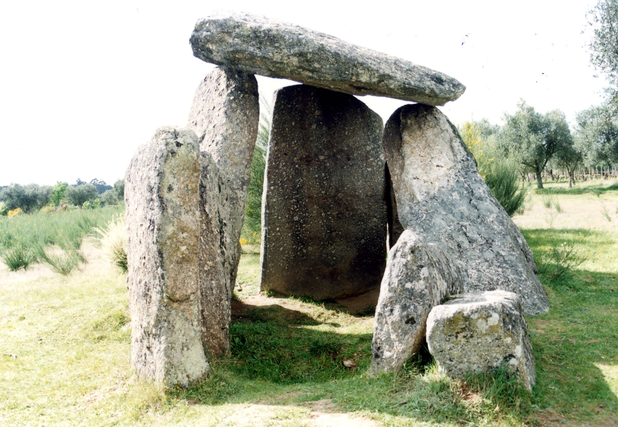 Anta da Pedra da Orca This file was uploaded for Wiki Loves Monuments in Portugal with the unique identifier 73021.